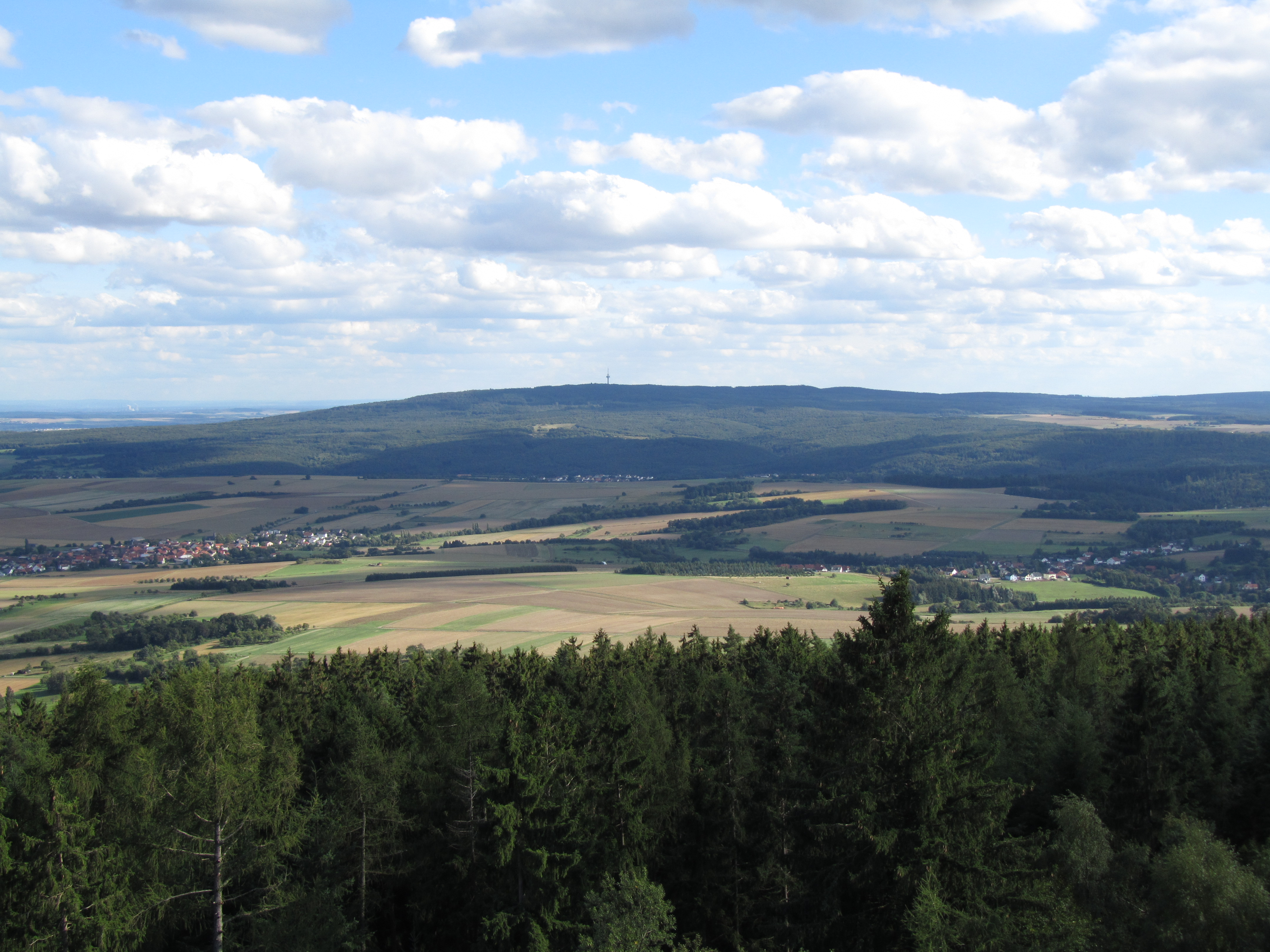 Der Steinkopf im Taunus, gesehen vom Hausbergturm.